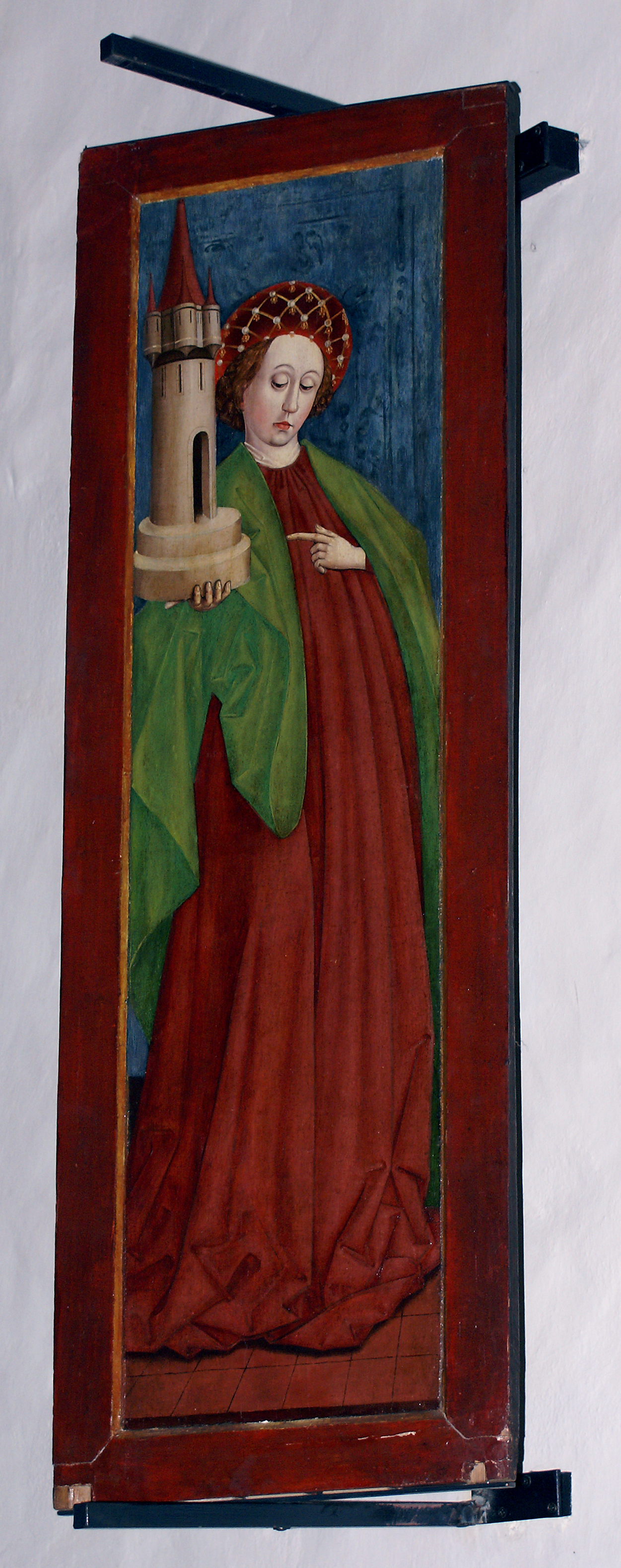 Altarflügel Heilige Barbara